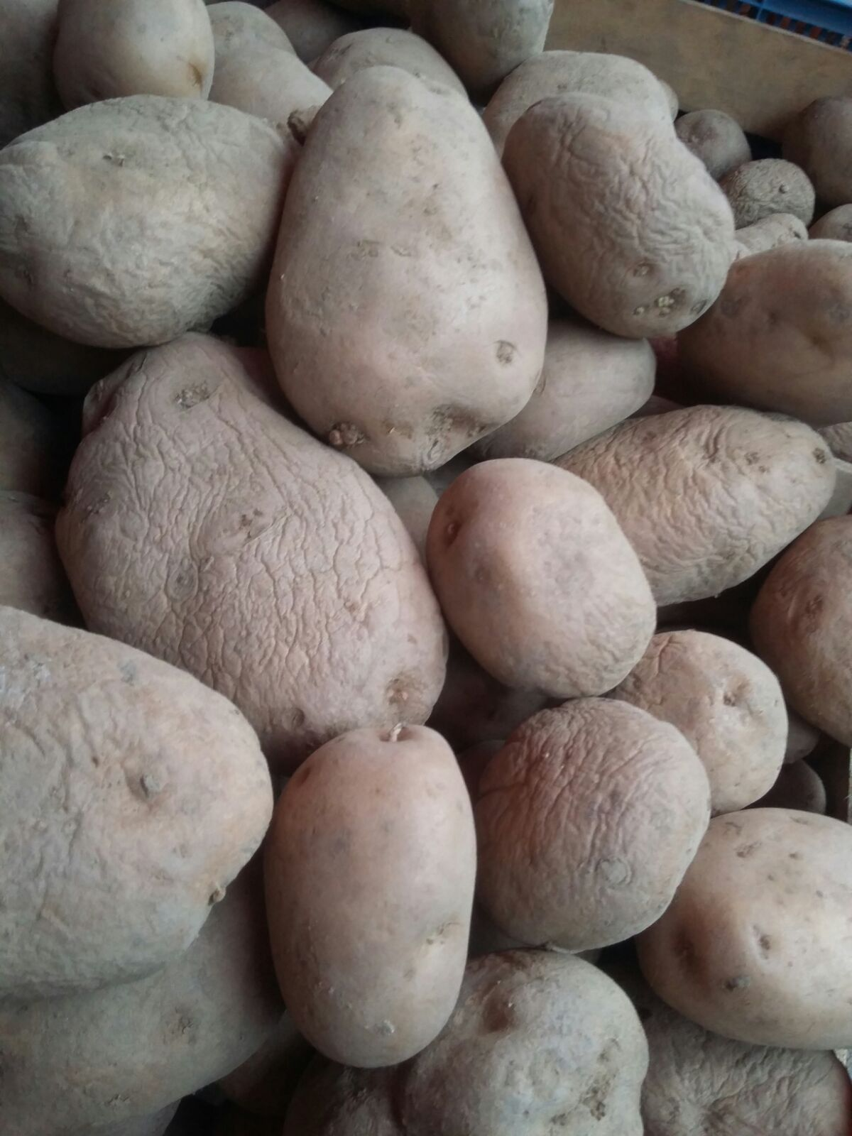 кромпир у трговини